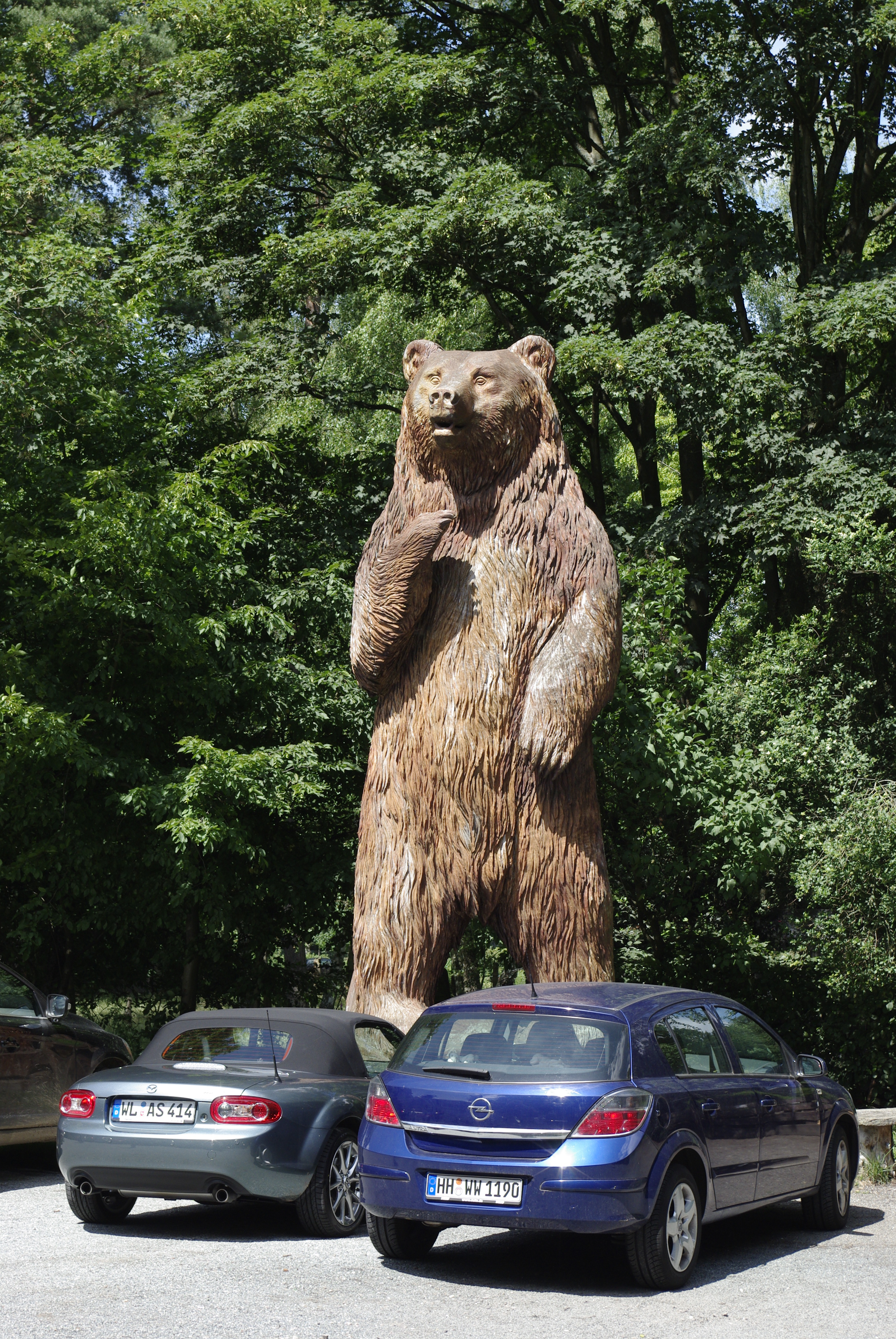 Geschnitzter Bär des Bildhauer Erich Gerer. Entstanden: 2001, Gewicht: 15 Tonnen, Höhe: 6,5m, Durchmesser: 2,50m